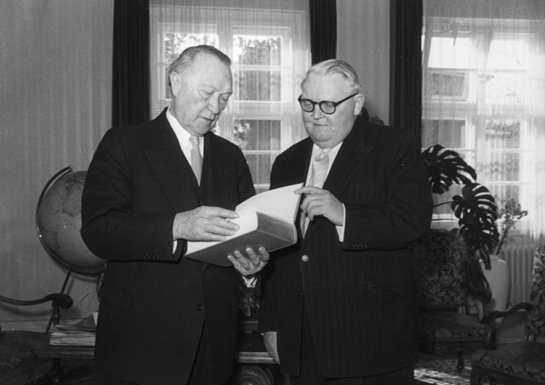 5.1.1956 Bundeskanzler Konrad Adenauer liest interessiert in dem Buch, das ihm Bundes-Wirtschaftsminister Prof. Erhard als Geburtstagsgeschenk überreichte.